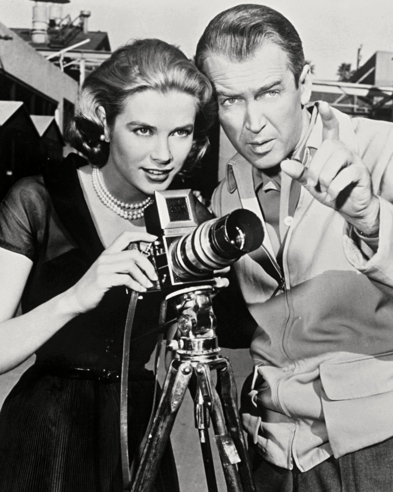 Grace Kelly & James Stewart Publicity Photo of film Rear Window, 1954